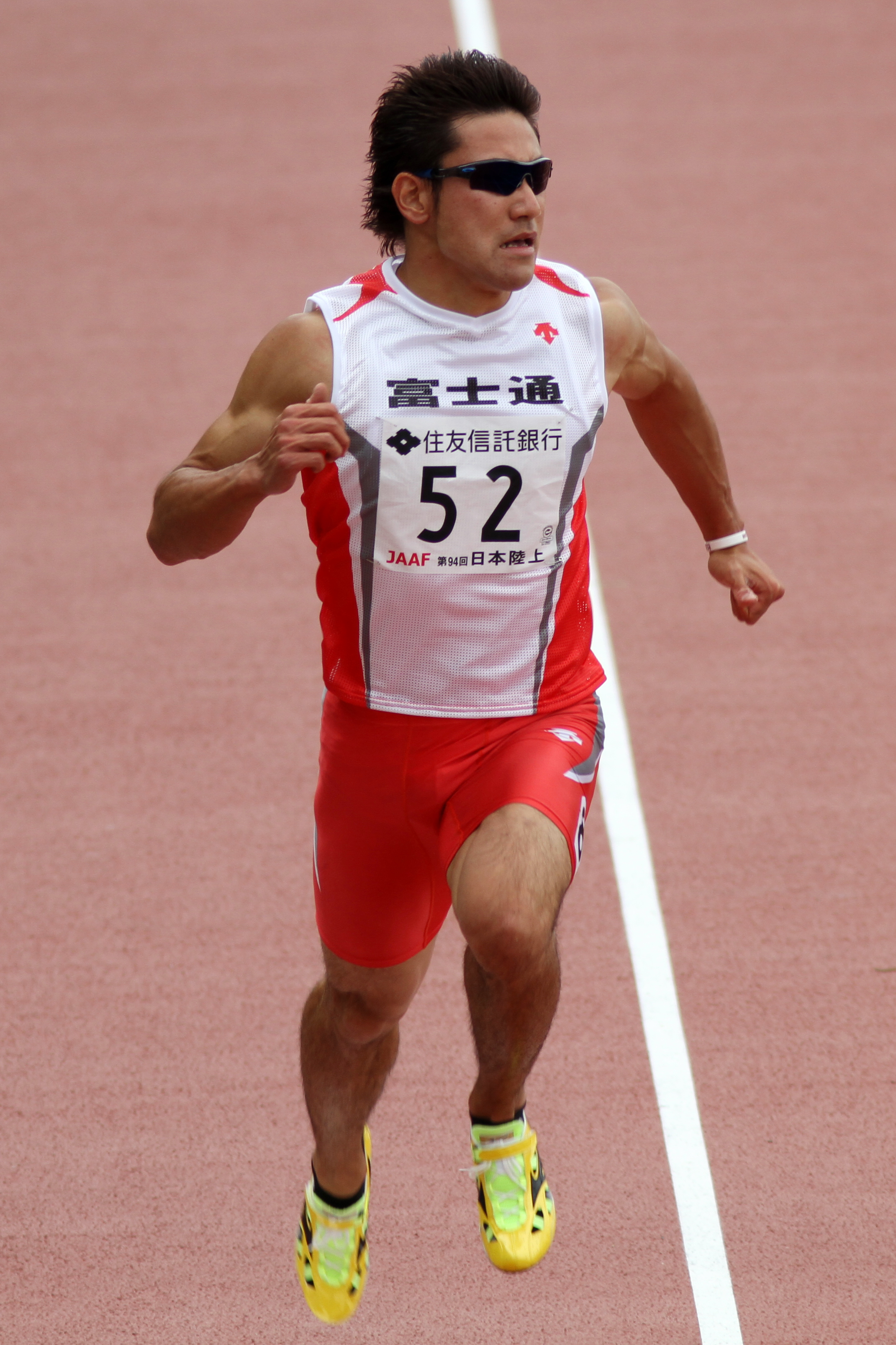 塚原 直貴(富士通) 第94回日本陸上競技選手権大会